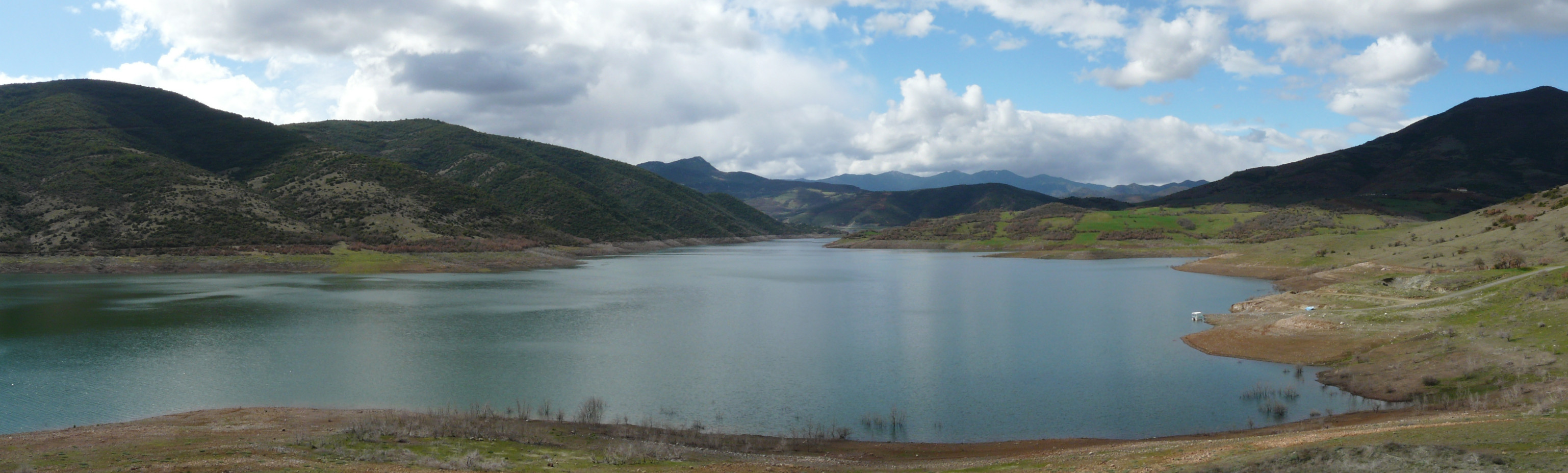 Panorama Smokovo lake